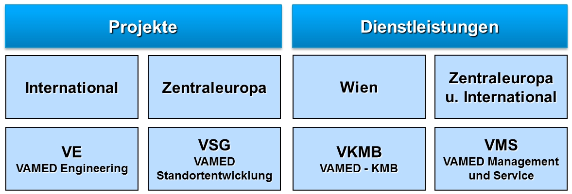 Abbild der Struktur der VAMED Gruppe (Die Leistungen der VAMED gliedern sich in zwei Bereiche – Projektgeschäft und Dienstleistungsgeschäft)